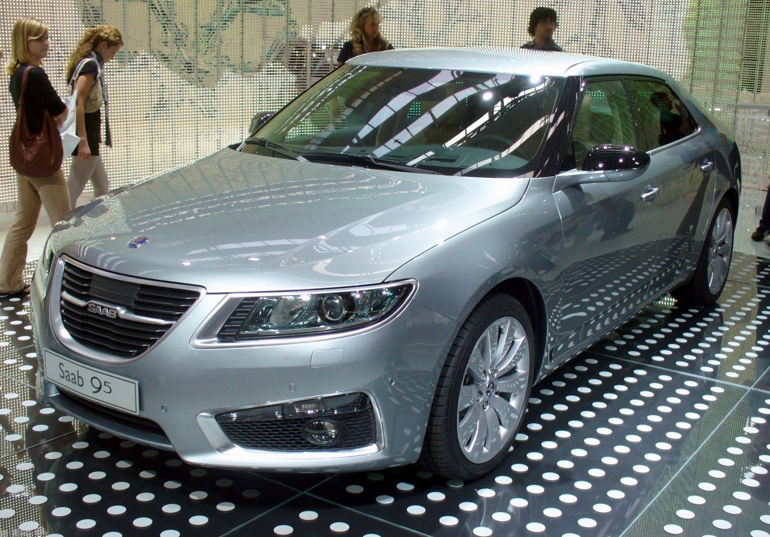 Saab 9-5